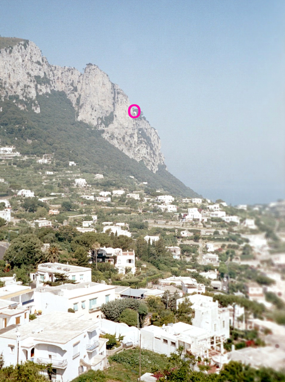 Vue op Capri .